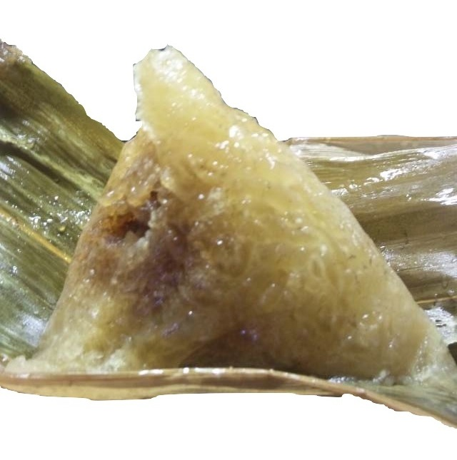 包有紅豆餡的鹼粽